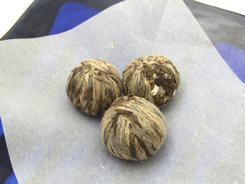 茉莉仙桃 – 撮影者提供 – Category:飲料画像